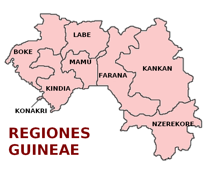 Regiones Guineae